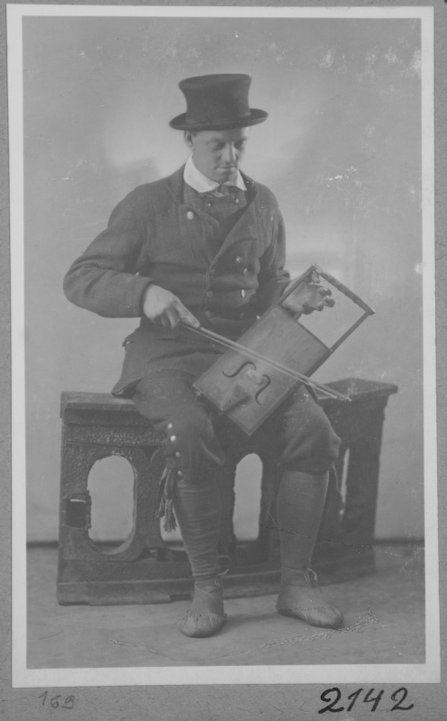 Hiiukandle mängija